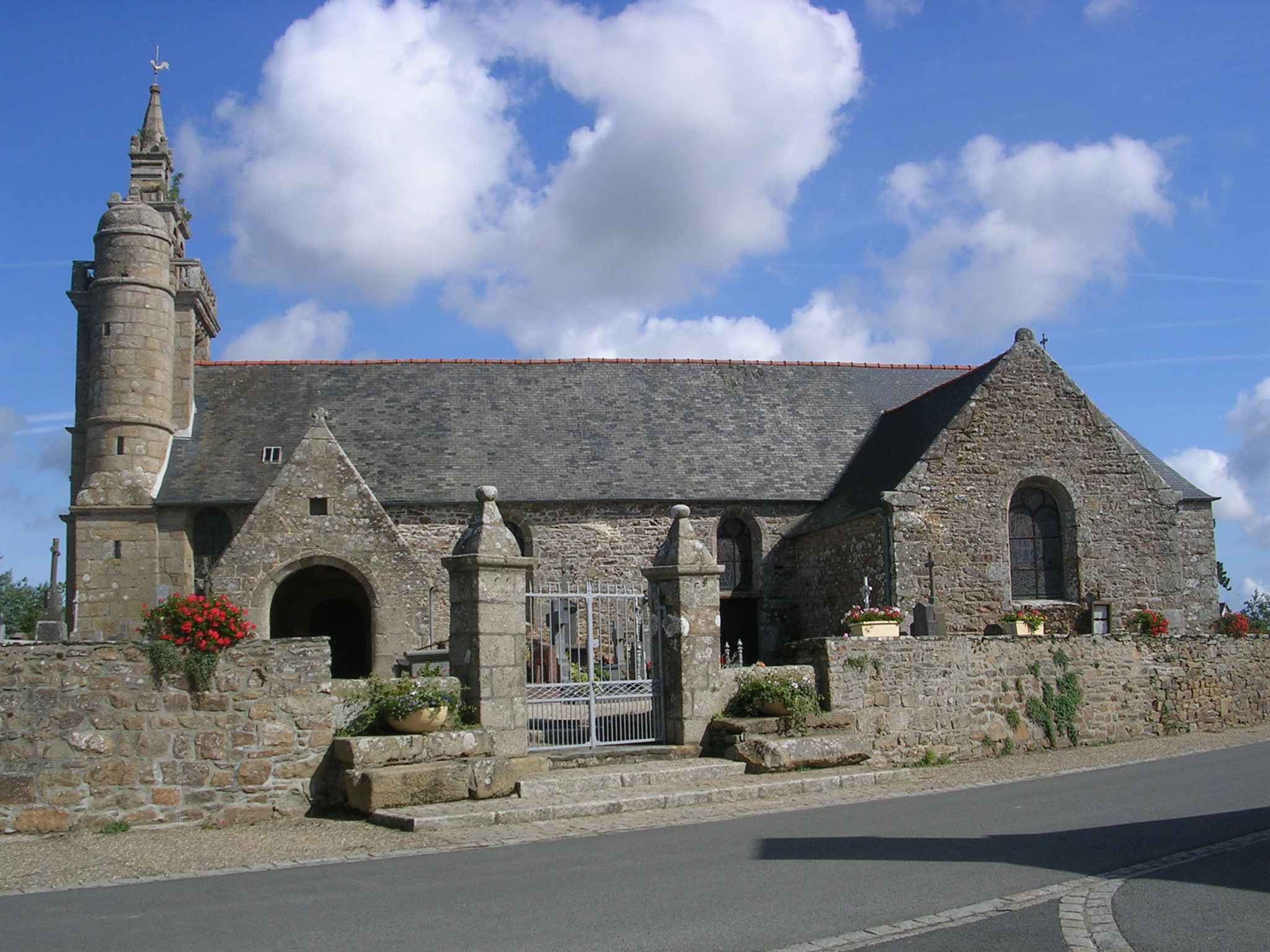 Église Saint-Pierre, (Inscription, 1926) .